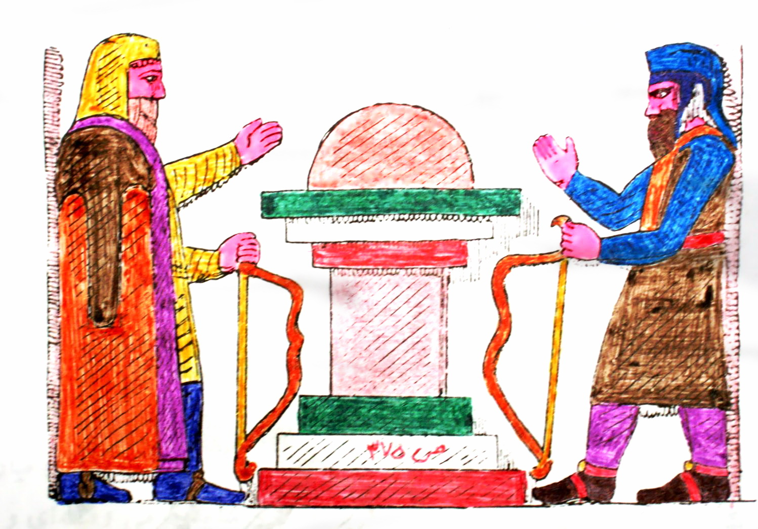 گرته‌ای از نقش بر جست گور دخمه‌ای قیزقاپان، مرد راست قربانی دهنده محتملا کیاکسار (هوخشتره) و مرد چپ مغ است. در نام این تصویر به اشتباه آن فرد را آشوری ذکر کرده‌اند. درصورتیکه اتحادیه ماد برای رویارویی با قوم آشوری (سوریه امروزی) تشکیل شده بود